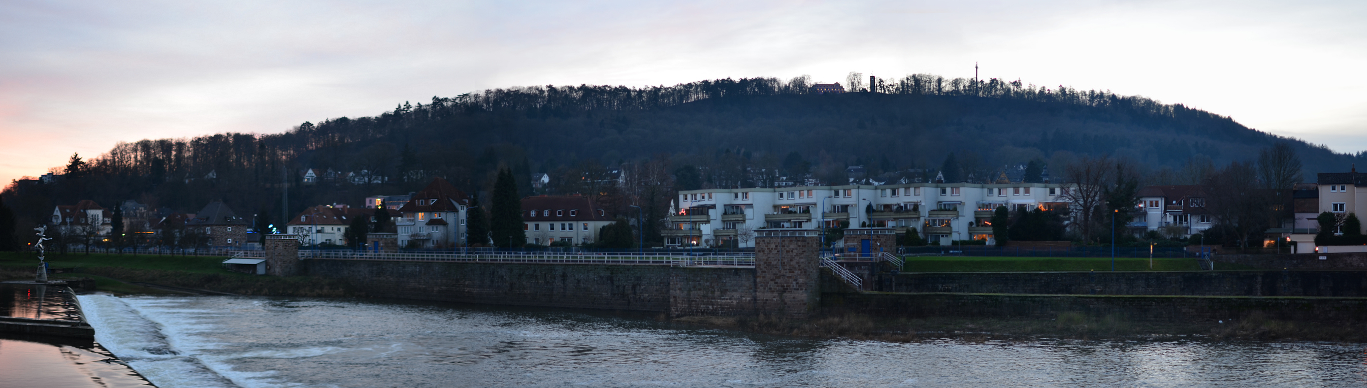 Klüt, von Hameln und der Weser gesehen